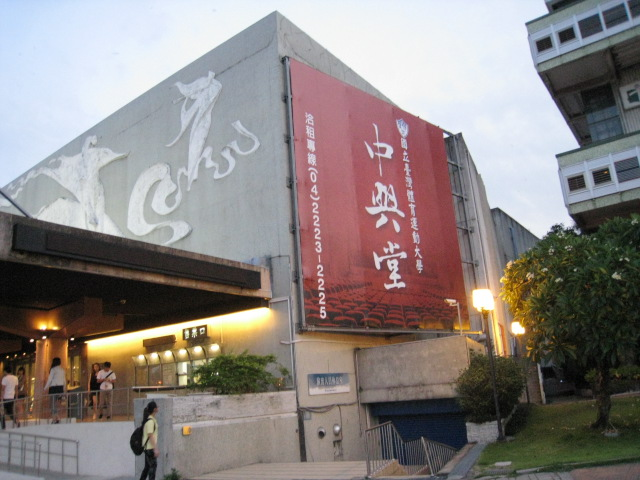 台灣台中市